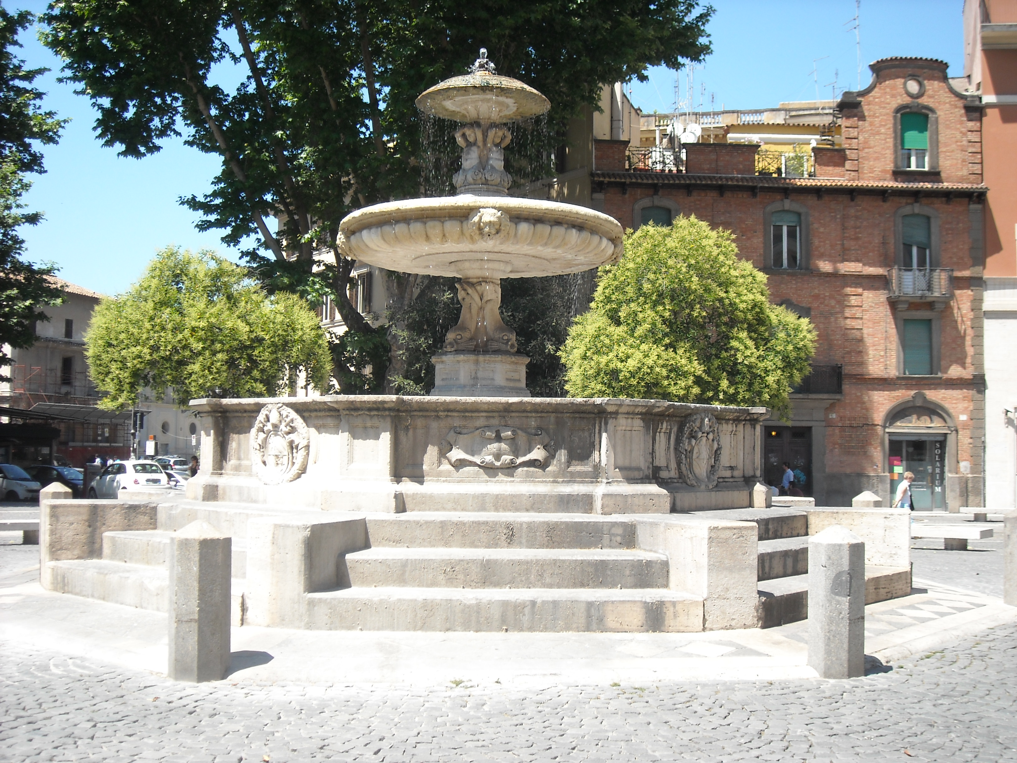 La fontana al centro di piazza Mastai, a Roma